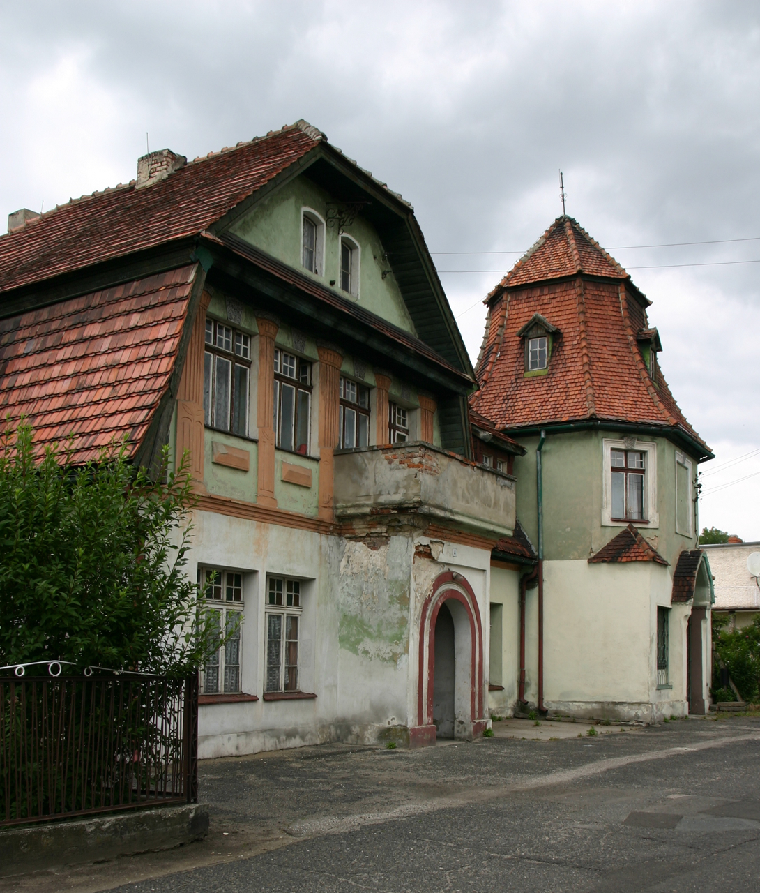 Obrowiec - dawny gościniec.